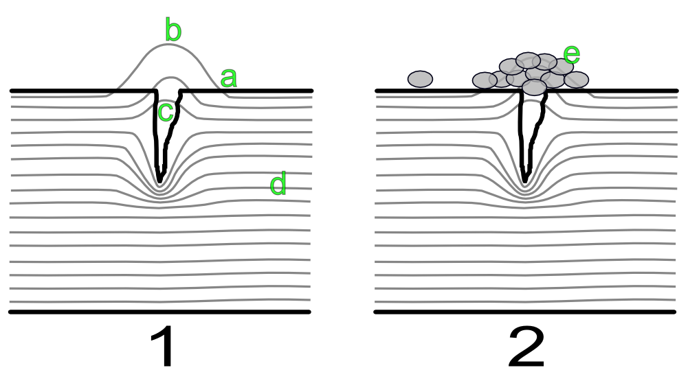 defect in MPI